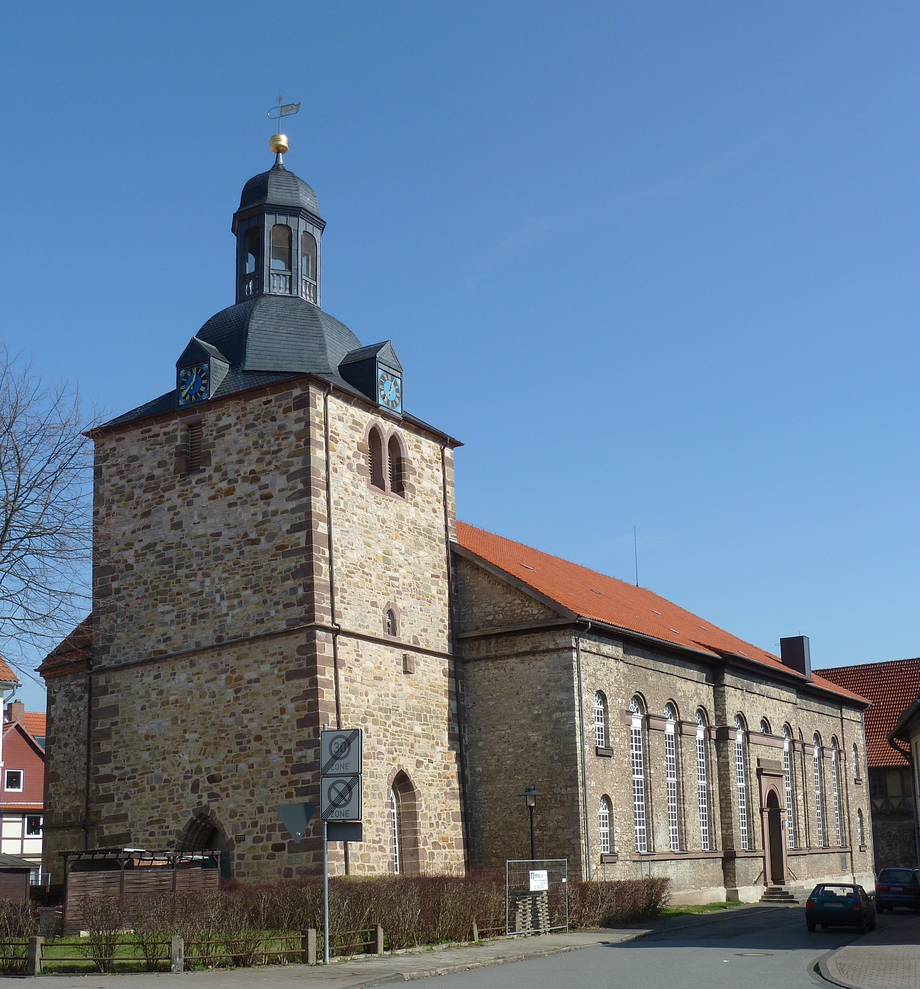 Ev.-luth. Liebfrauenkirche in Moringen, Landkreis Northeim, Südniedersachsen. Turm Ende 15. Jh., Kirchenschiff 1847-50 entsprechend dem Kirchenschiff in Dransfeld (Planung: Friedrich August Ludwig Hellner) erbaut. Heute zur Trinitatis-Kirchengemeinde Leine-Weper